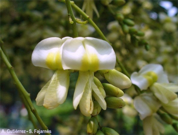 Sophora japonica (Acacia del Japón) : Flores, detalle.